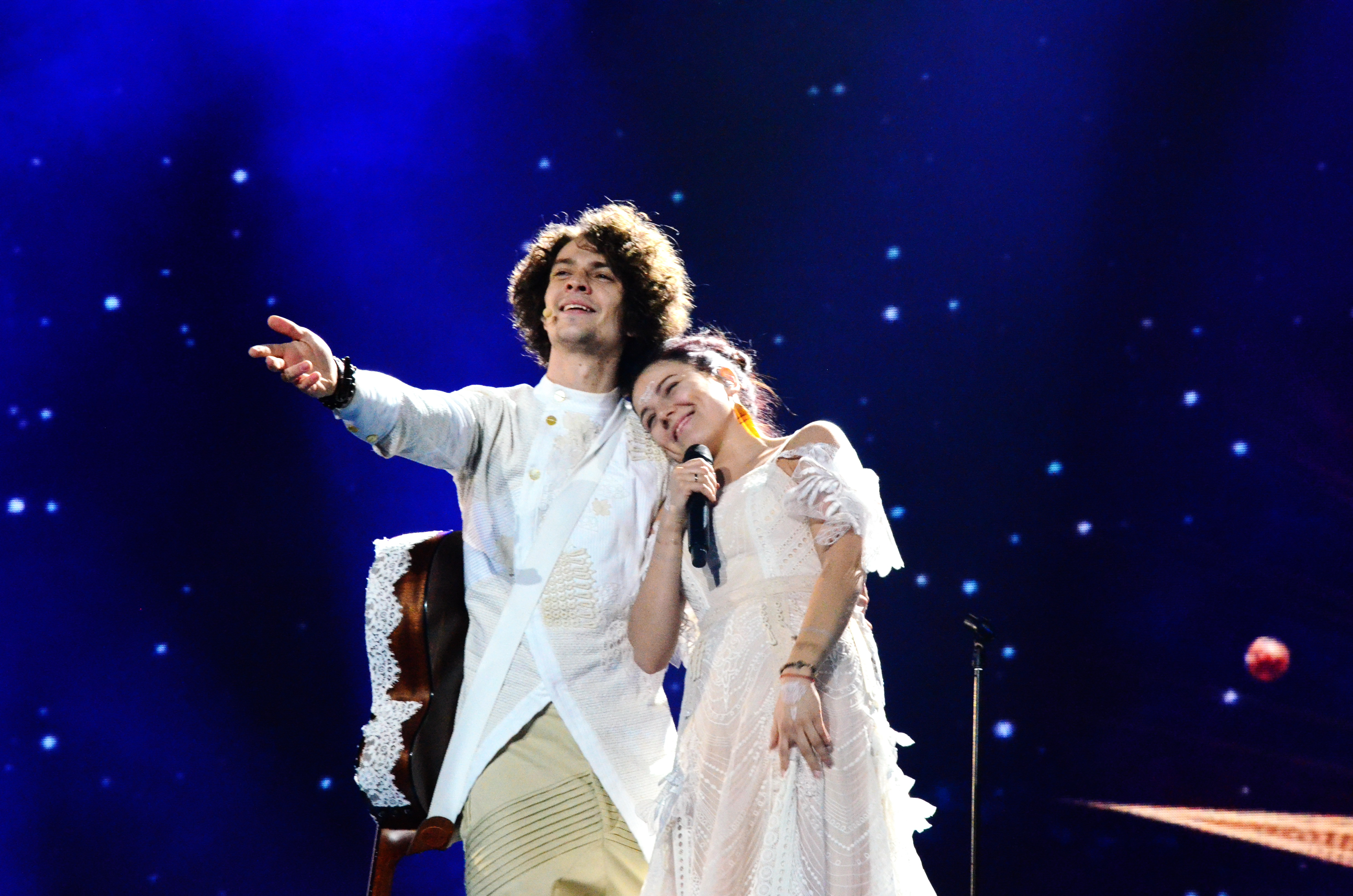 12 травня. Генеральна репетиція фіналу Євробачення 2017. NaviBand, Belarus.